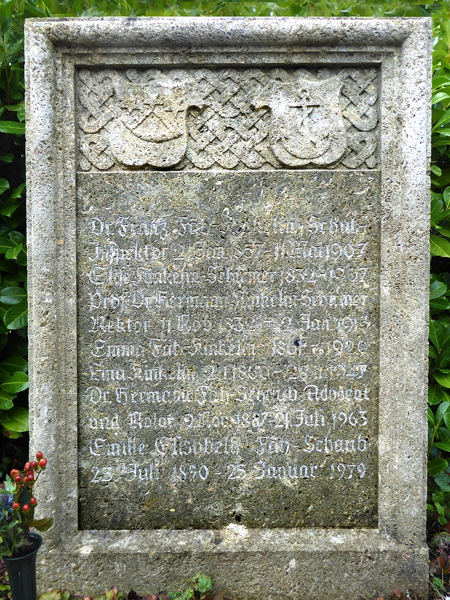 Franz Fäh-Kinkelin (1857–1907) Primarschulinspektor, Lehrer für Deutsch und Geschichte, Historiker, Autor von Historischen Studien aus der Geschichte der Schweiz im 17. Jahrhundert, Familiengrab auf dem Friedhof Hörnli, Riehen, Basel-Stadt